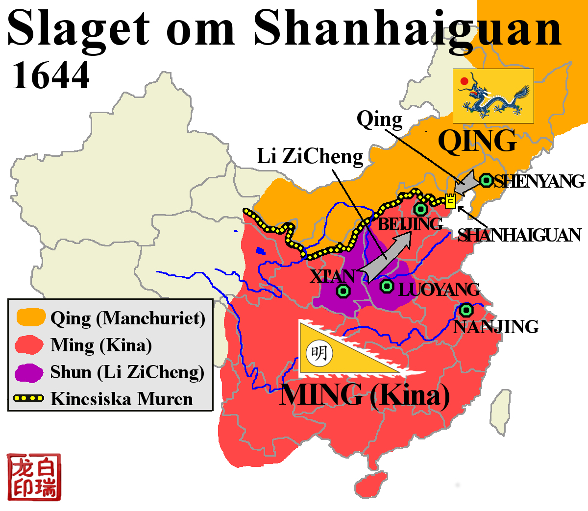 Karta över Slaget om Shanghaiguan